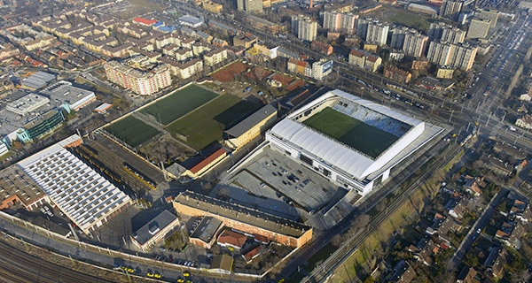 Hidegkúti Nándor Stadion